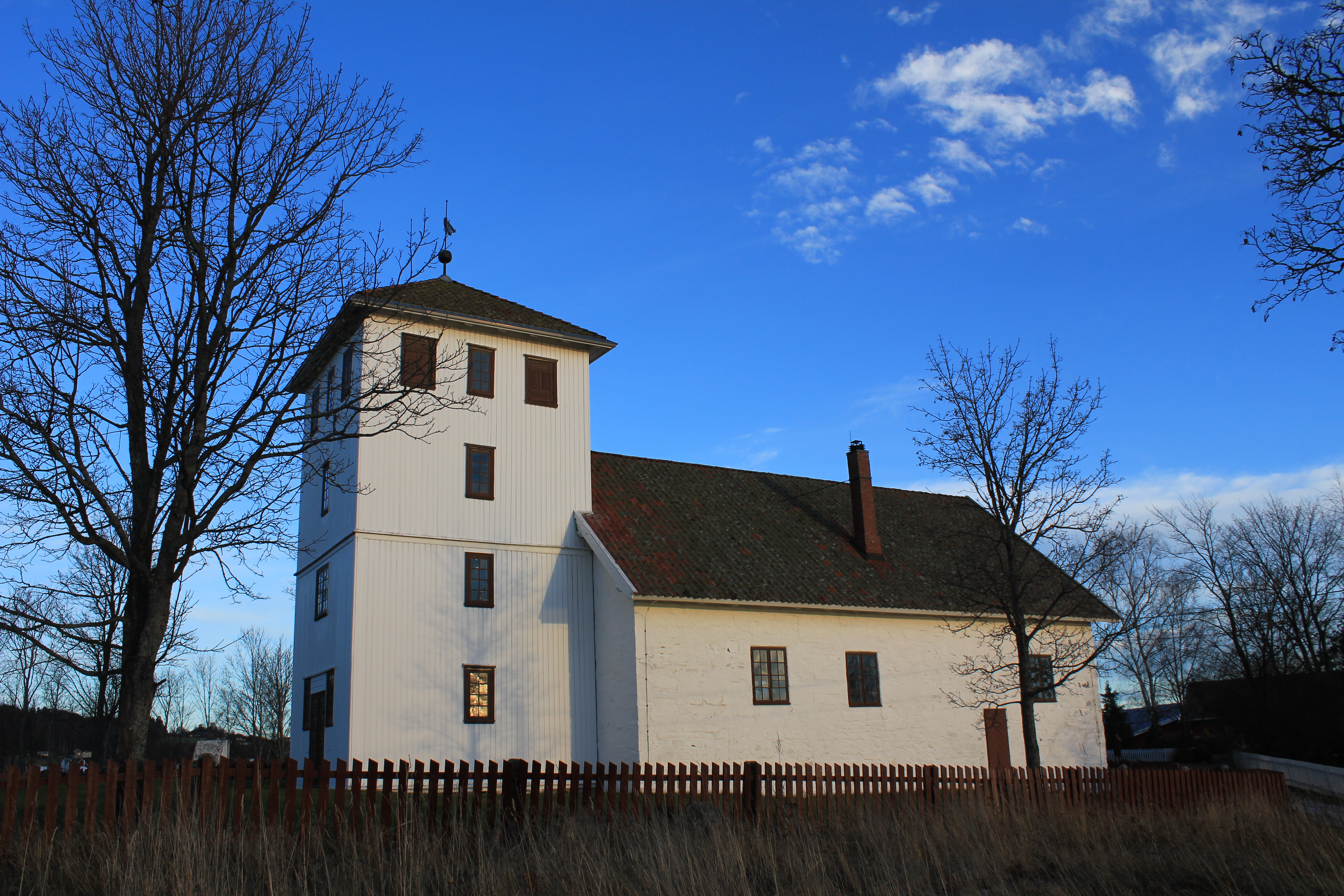 Bønsnes kirke i Buskerud ved Tyrifjorden, Norge.